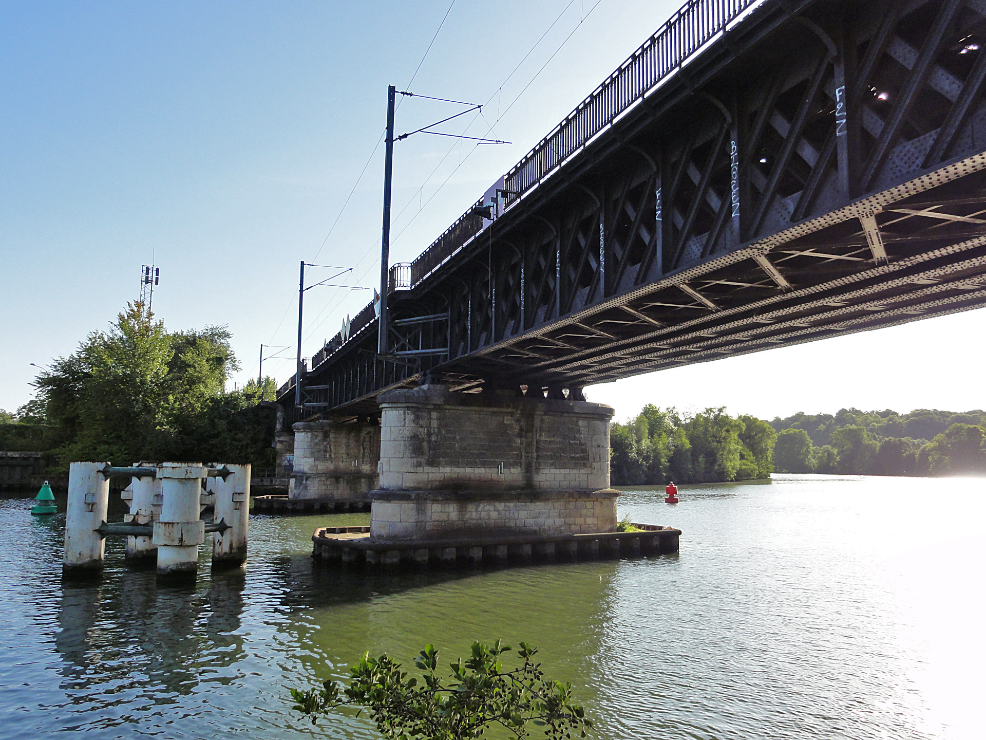 Le pont ferroviaire de Chaponval à Auvers-sur-Oise (Val-d'Oise), situé sur la ligne de Pierrelaye à Creil.